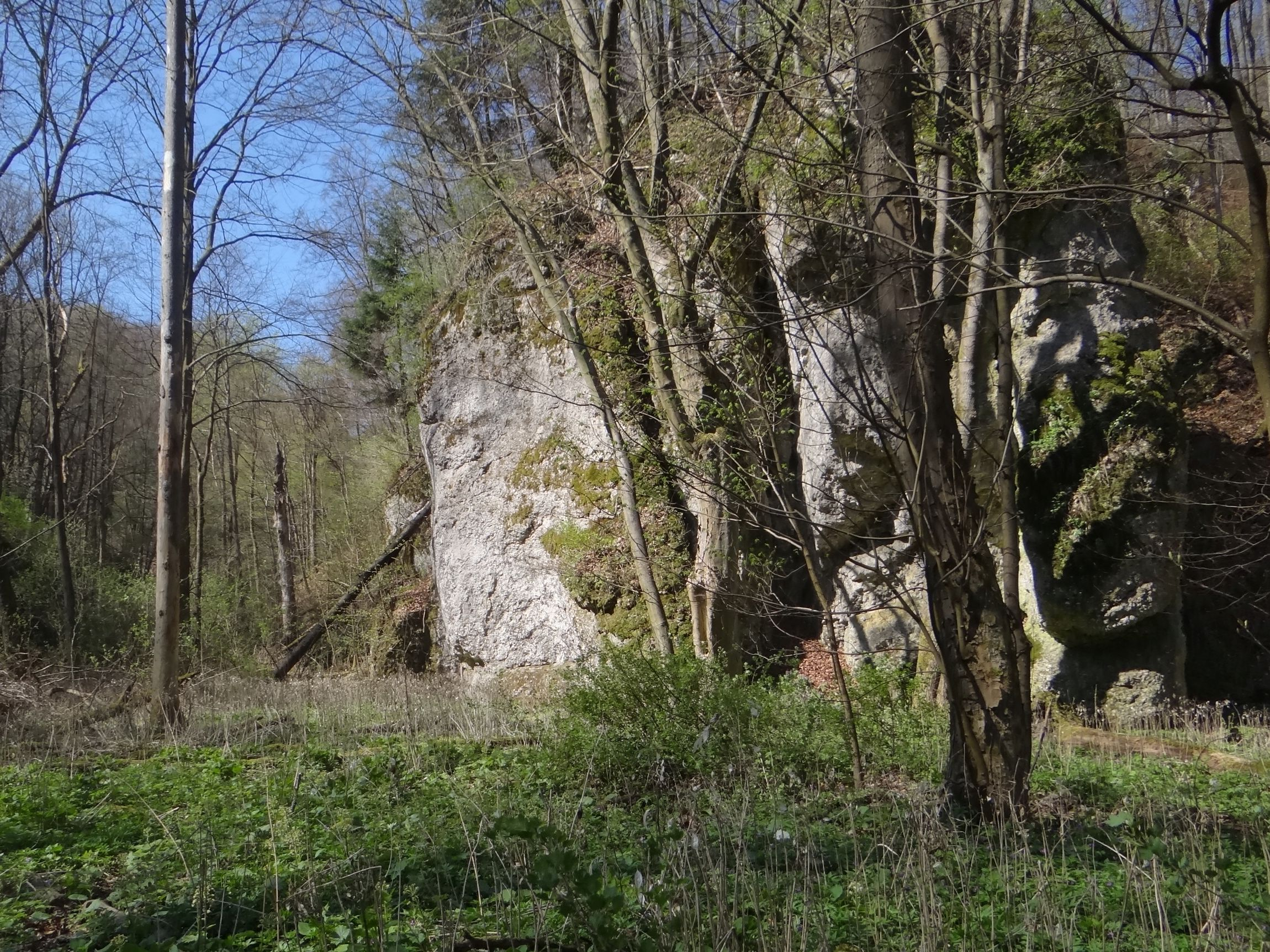 Garncarskie Skały w Dolinie Sąspowskiej